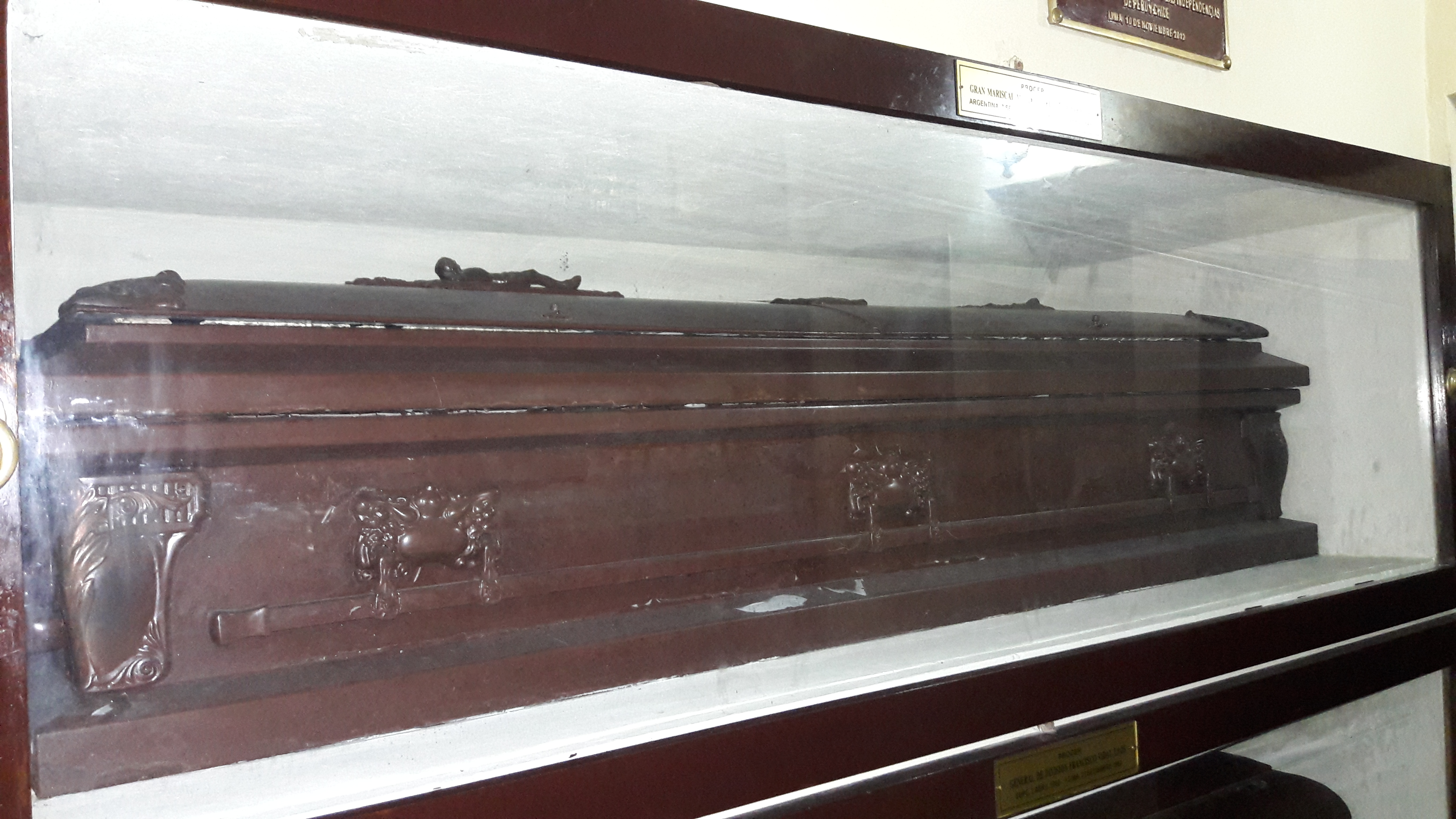 Tumba de Mariano Necochea